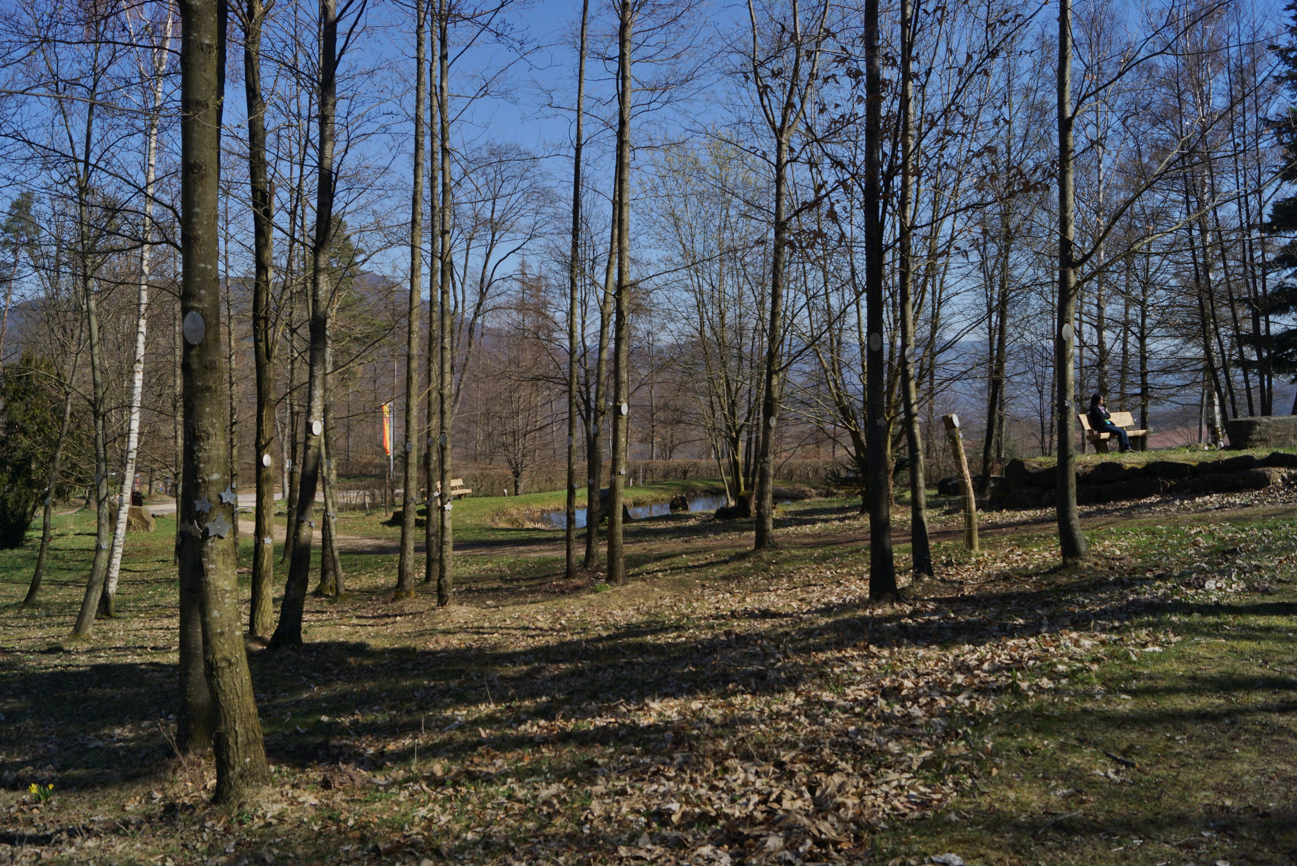 Germany, Rheinland-Pfalz - Pfälzerwald 338 m ü. NHN